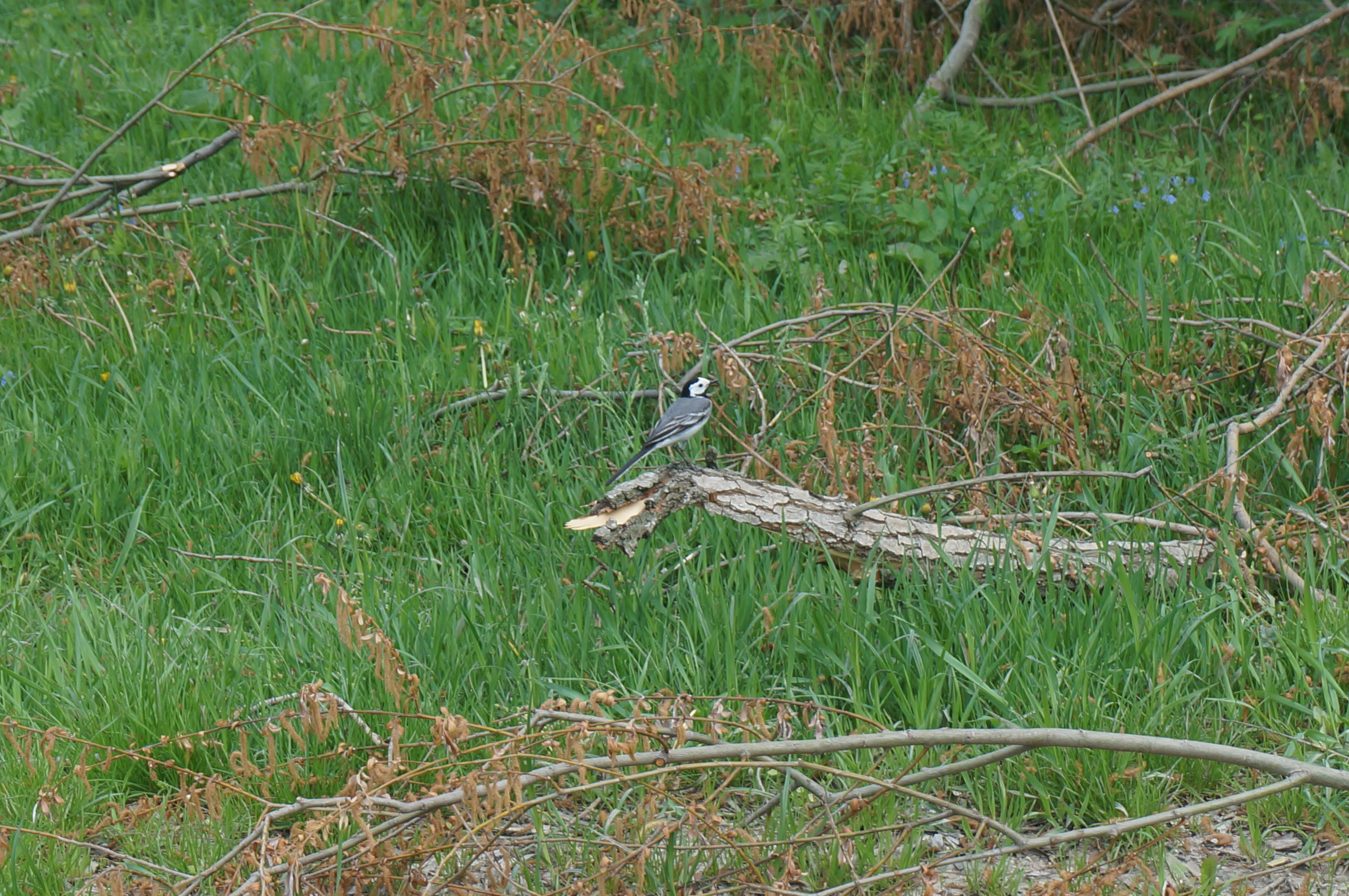 Codru, monument al naturii amplasat în raionul Strășeni, satul Lozova (cod MD-ST-rs-001)